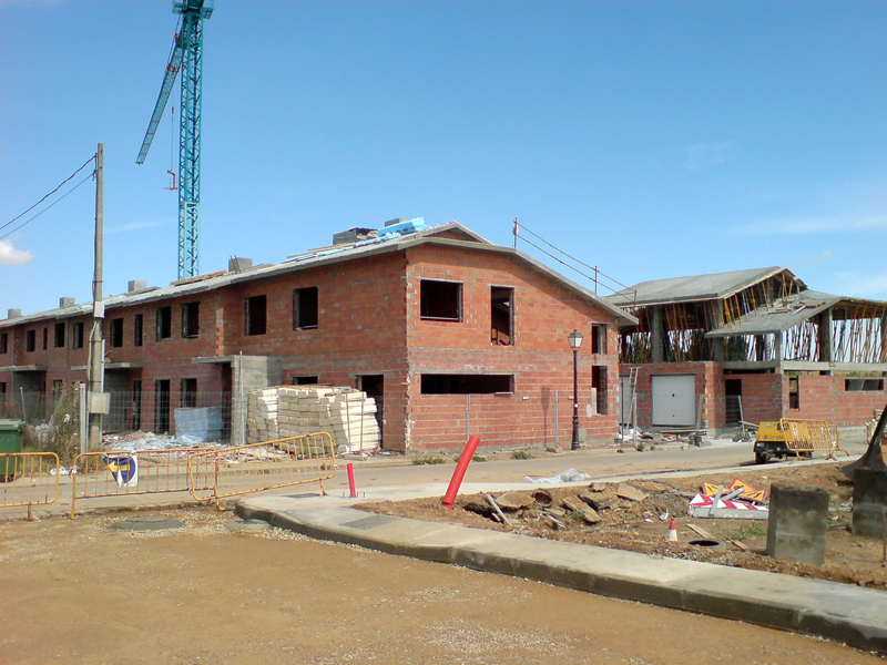 Nuevas viviendas en Villamañán.